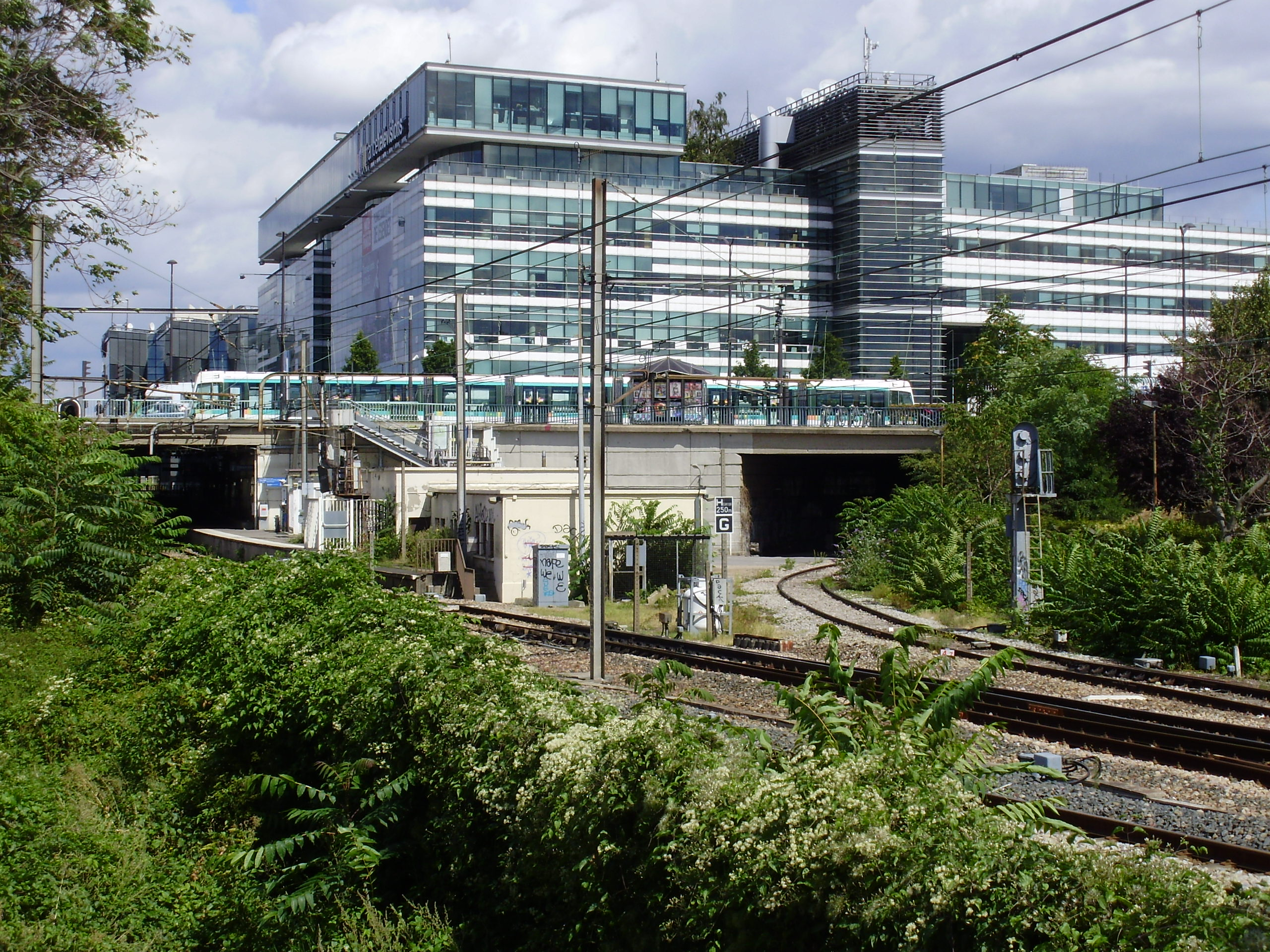 Raccordement (à droite), au sud de la gare du Pont du Garigliano (à gauche), entre la ligne des Invalides à Versailles-Rive-Gauche et la ligne de Petite Ceinture, vu depuis le quai d'Issy-les-Moulineaux, à Paris 15e, France. On voit, au-dessus des voies, deux tramways devant le siège de France Télévisions.